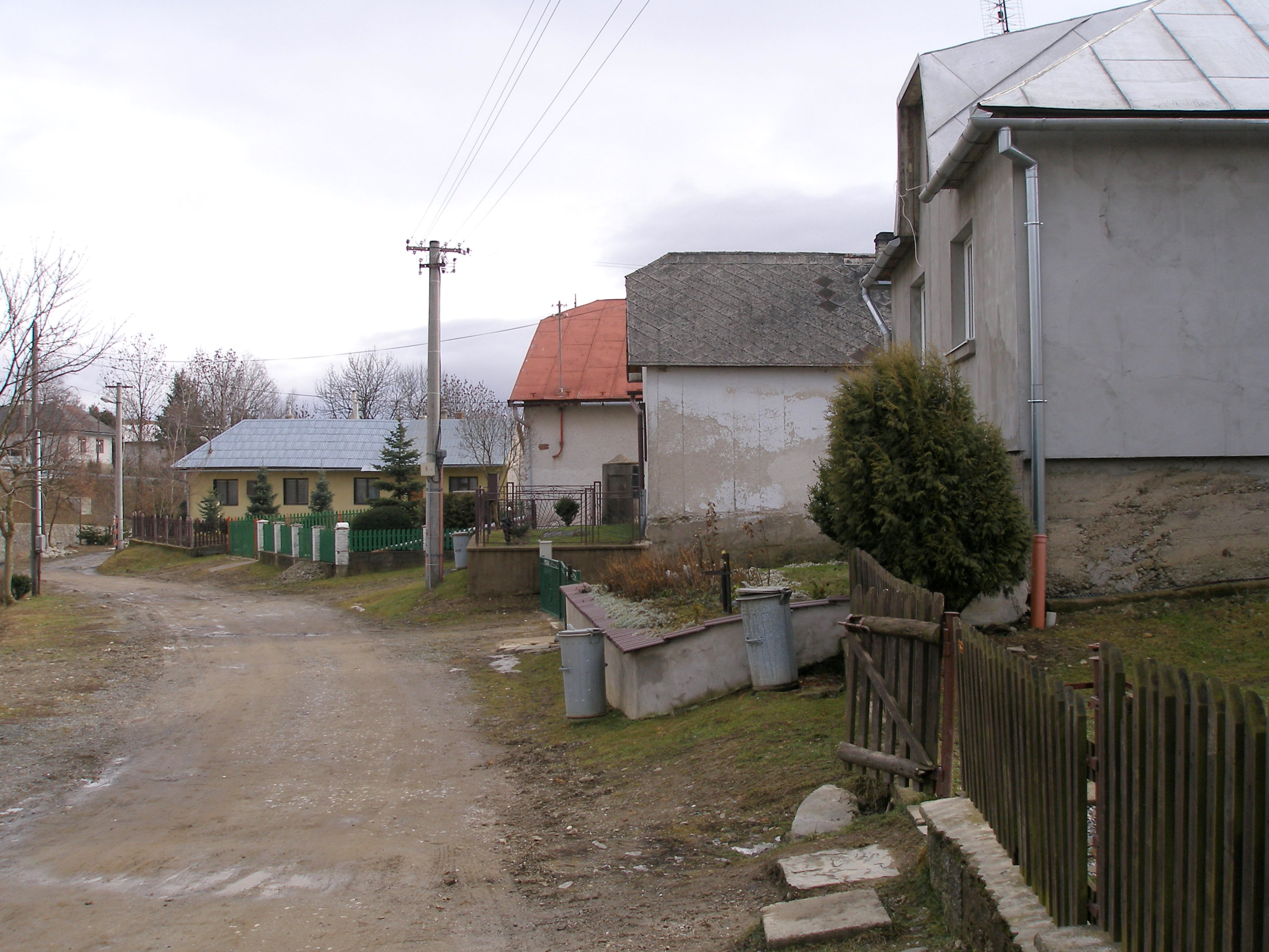 Obec Oľšov okres Sabinov región Šariš